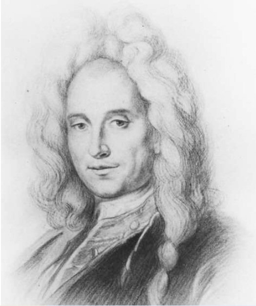 Johann Joseph Fux (* um 1660 in Hirtenfeld bei Graz; † 13. Februar 1741 in Wien)